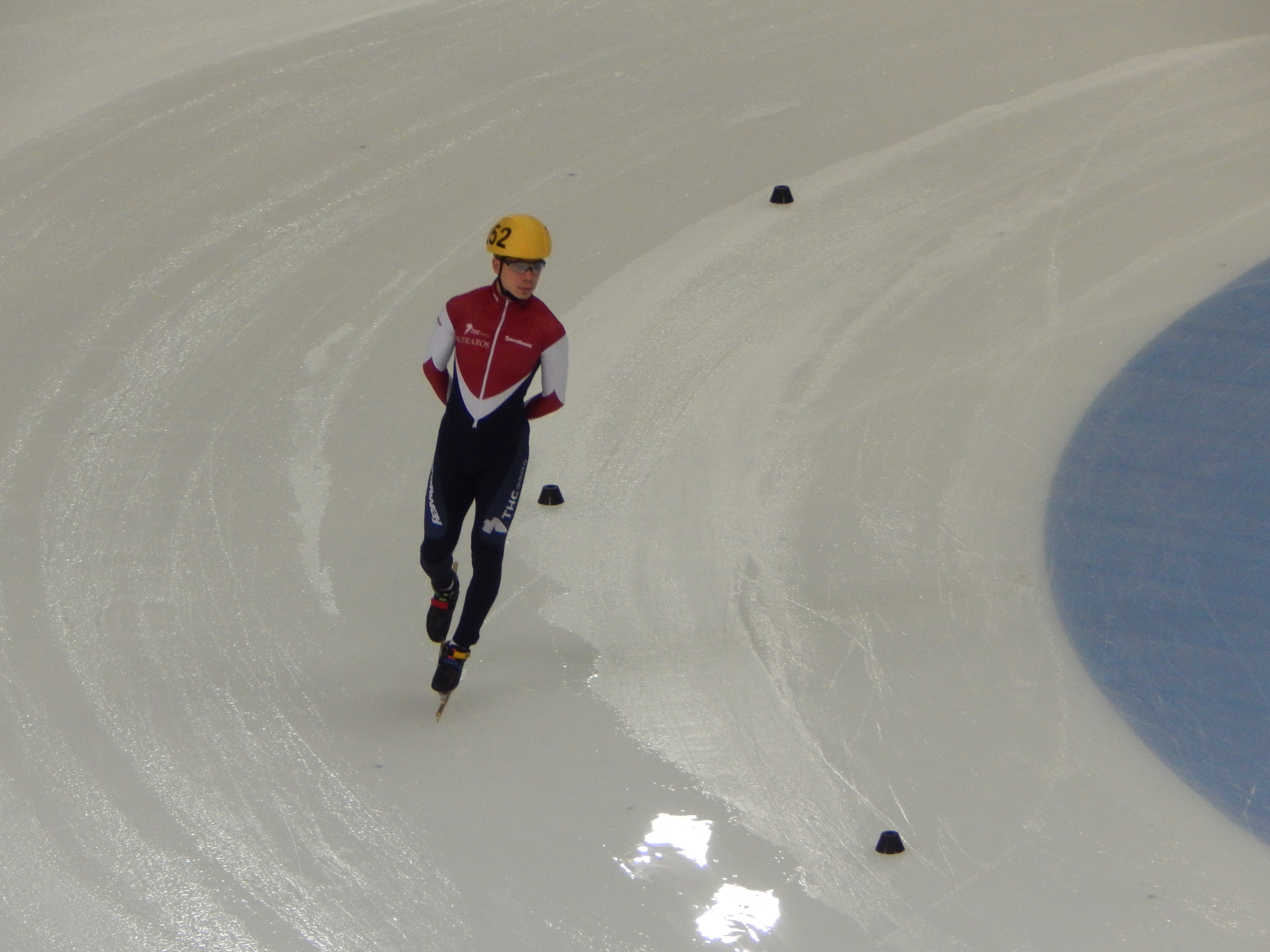 Чемпионат мира по шорт-треку 2015 в Москве Квалификационный раунд, 10 забег, 1000 м, мужчины